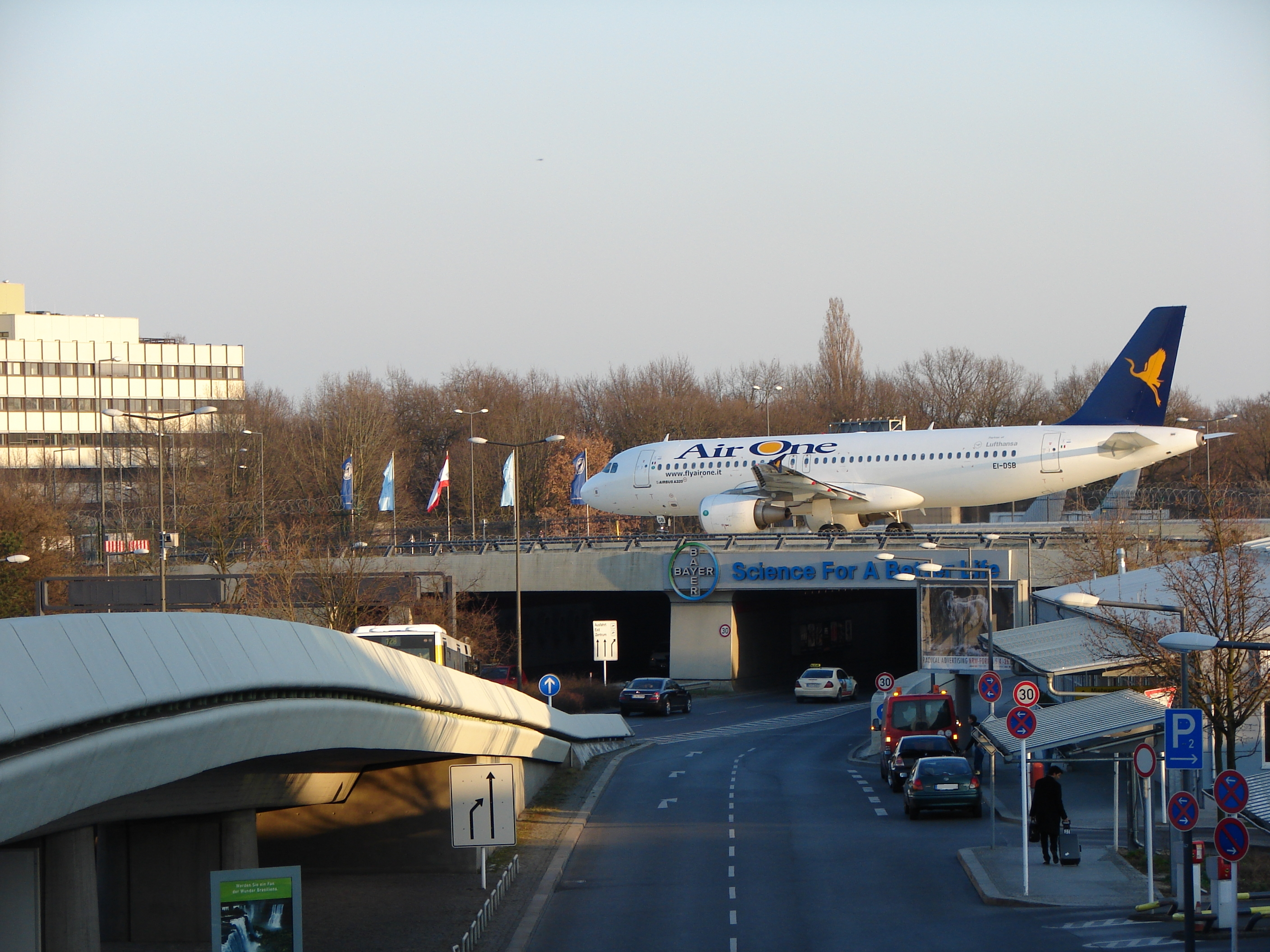 AirOne A320 Flughafen Berlin-Tegel